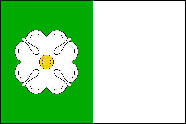 Vlajka obce Šerkovice